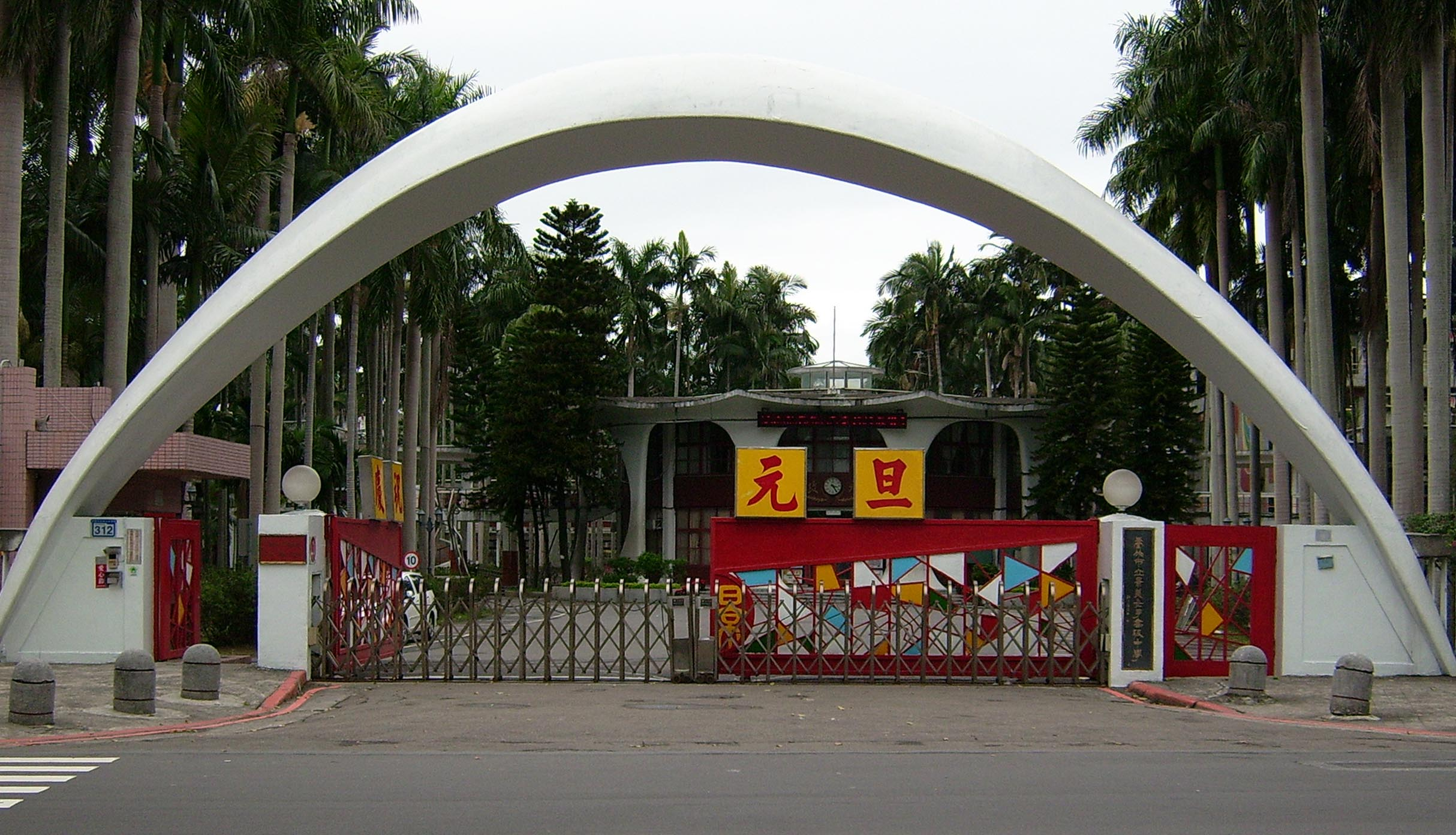 台北市立景美女子高級中學校門口（2006年12月31日下午）。